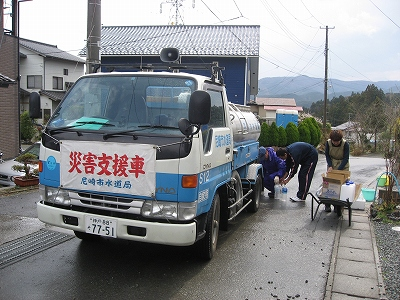 平成23年4月16日 陸前高田市での応急給水業務です。